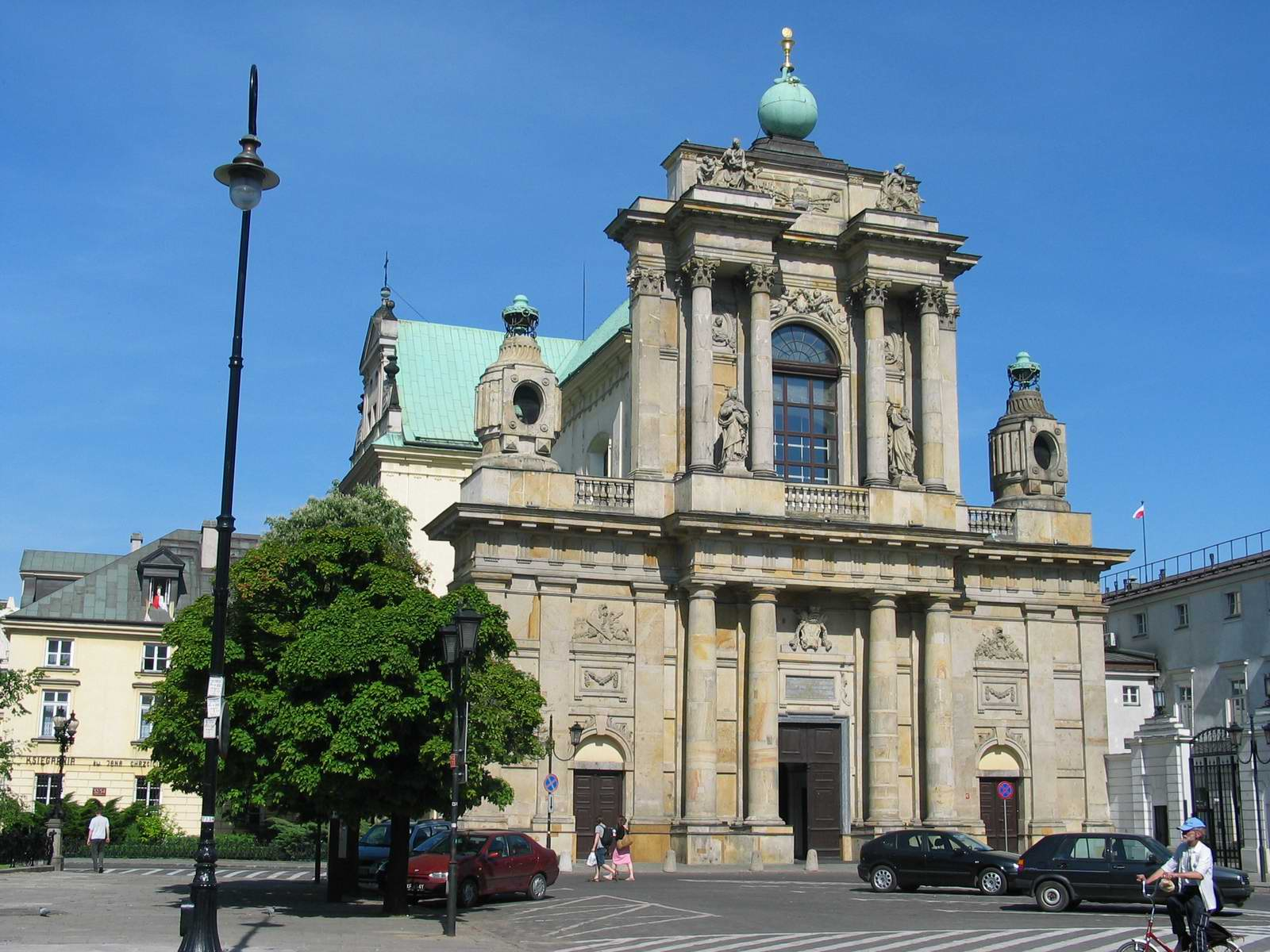 Kościół Karmelitów w Warszawie przy ul. Krakowskie Przedmieście